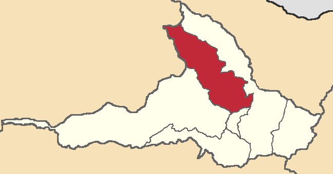 Mapa localizacor del cantón San Miguel de Urcuquí, Imbabura, Ecuador